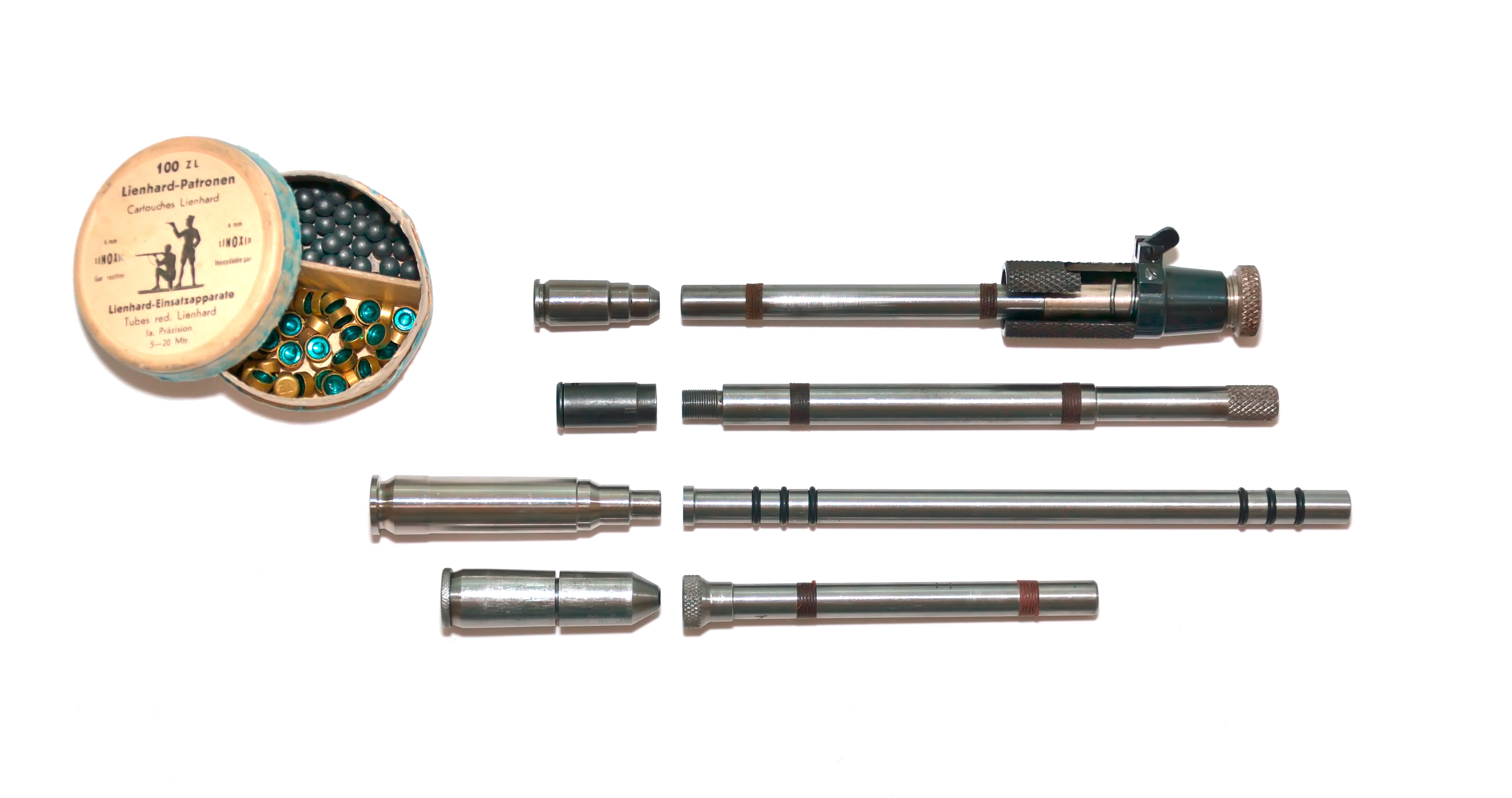 Système réducteur de tir pour: parabellum, pistolet P210, Fass 57 et mousqueton 31, fusils et mousquetons 11 & 31.